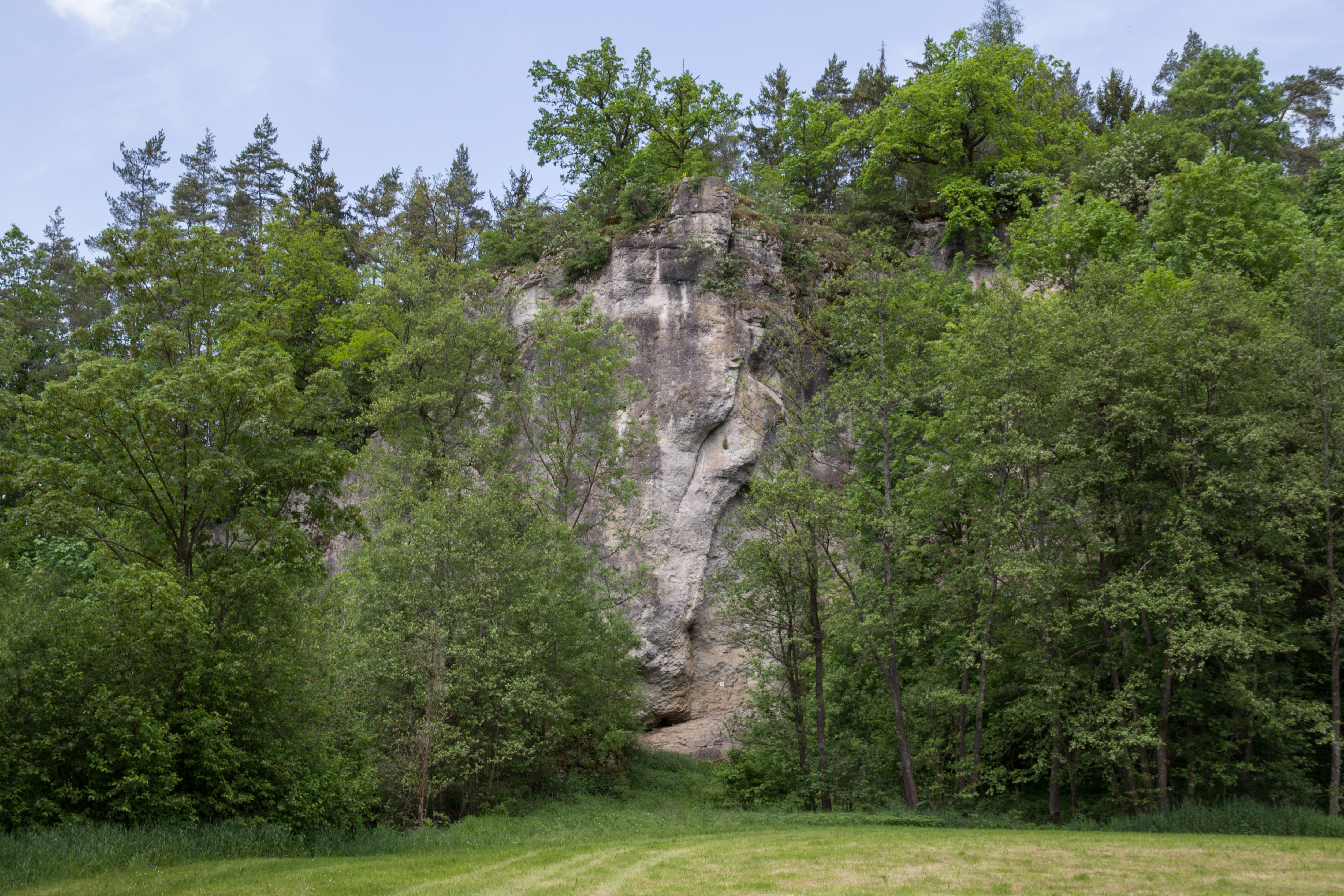 Schmelcherfels, Geotop, Naturdenkmal, Naturpark und LSG Fränkische Schweiz-Veldensteiner Forst, Steinamwasser